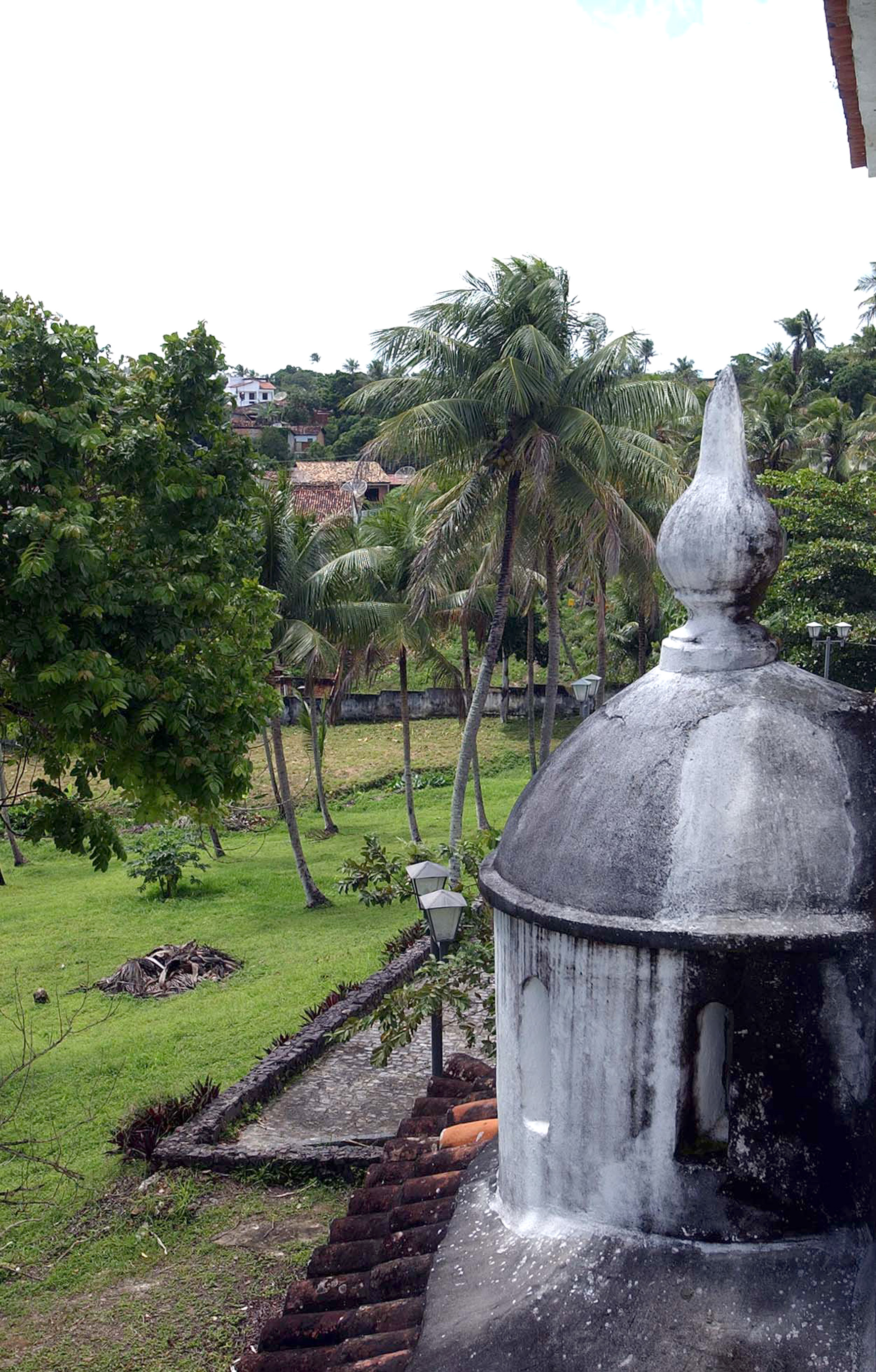 São Cristóvão, SE - Detalhes do Convento da Santa Cruz, no muncípio de São Cristóvão, antiga capital de Sergipe. Foto: Wilson Dias/ABr